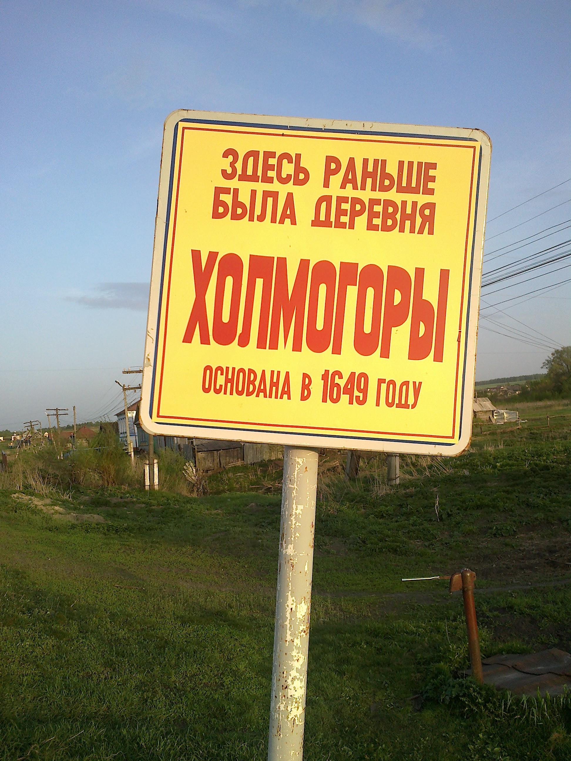 Бывшая деревня Холмогоры, с.Урено-Карлинское.